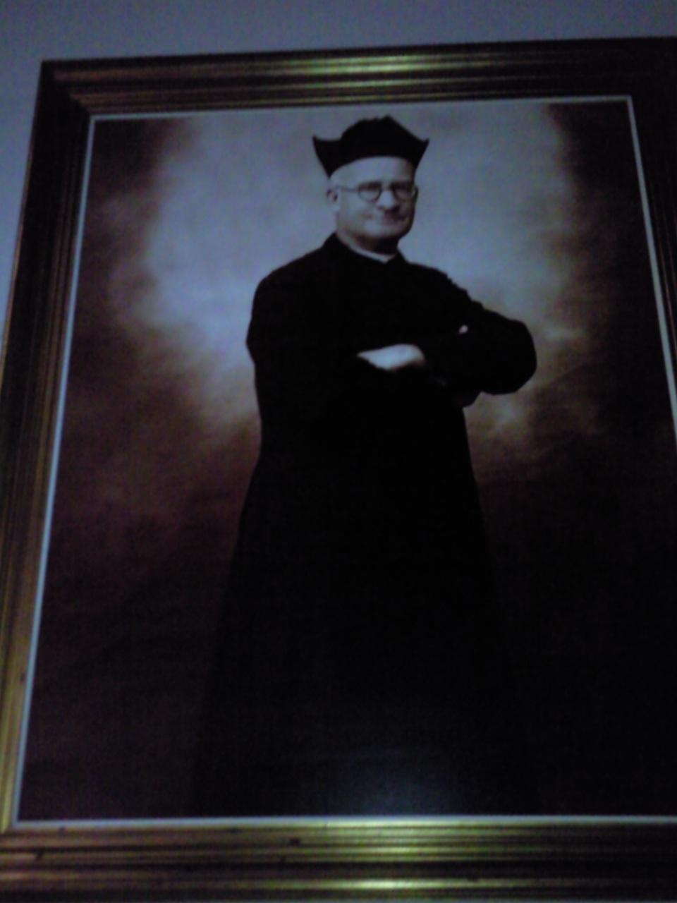 Foto sobre cuadro del Beato Manuel Gomez situado en la Ermita de Montemayor.